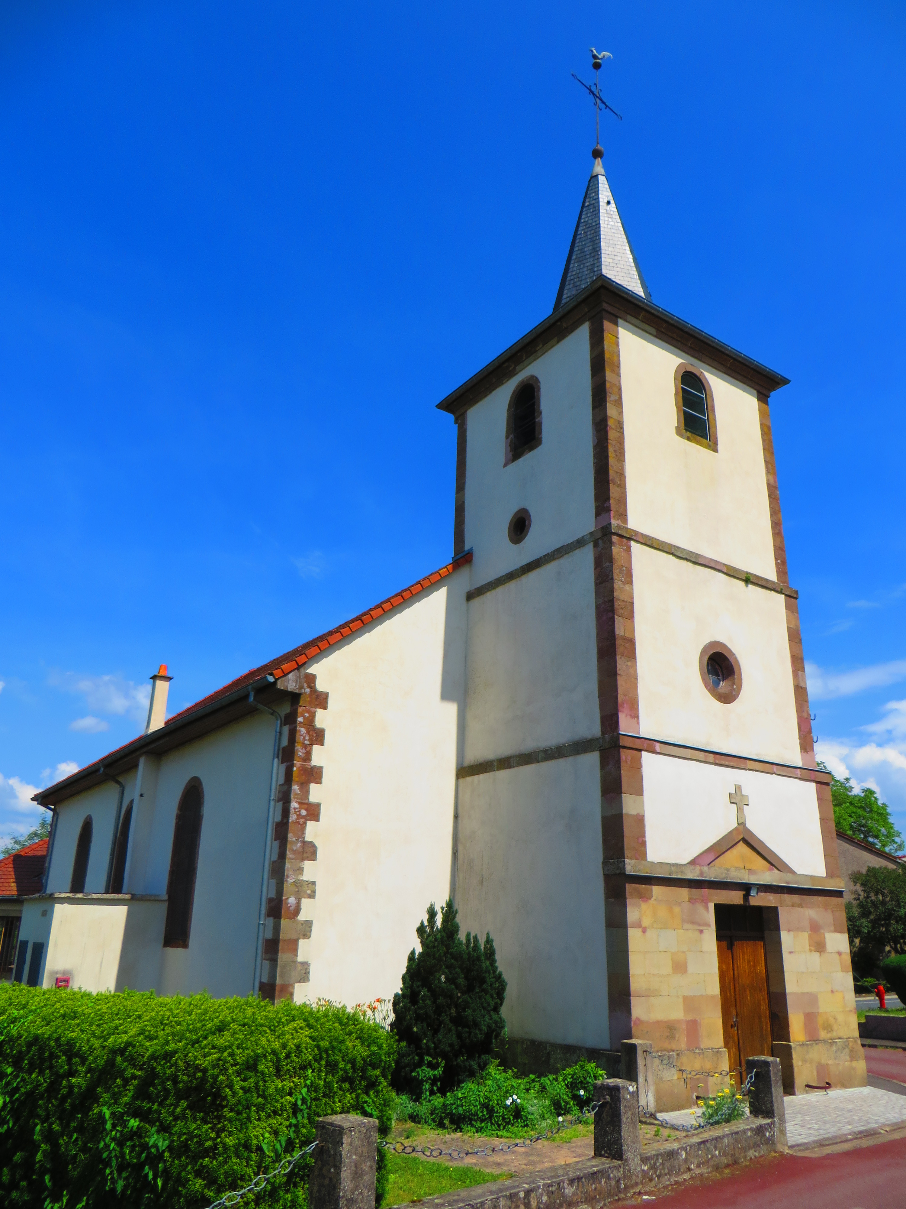 Niderhoff eglise